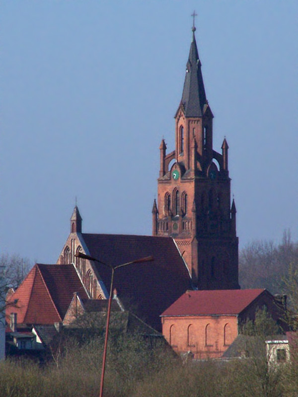 Dobra, ul. Armii Krajowej 7a - rzymskokatolicki kościół parafialny p.w. św. Klary, kon. XV